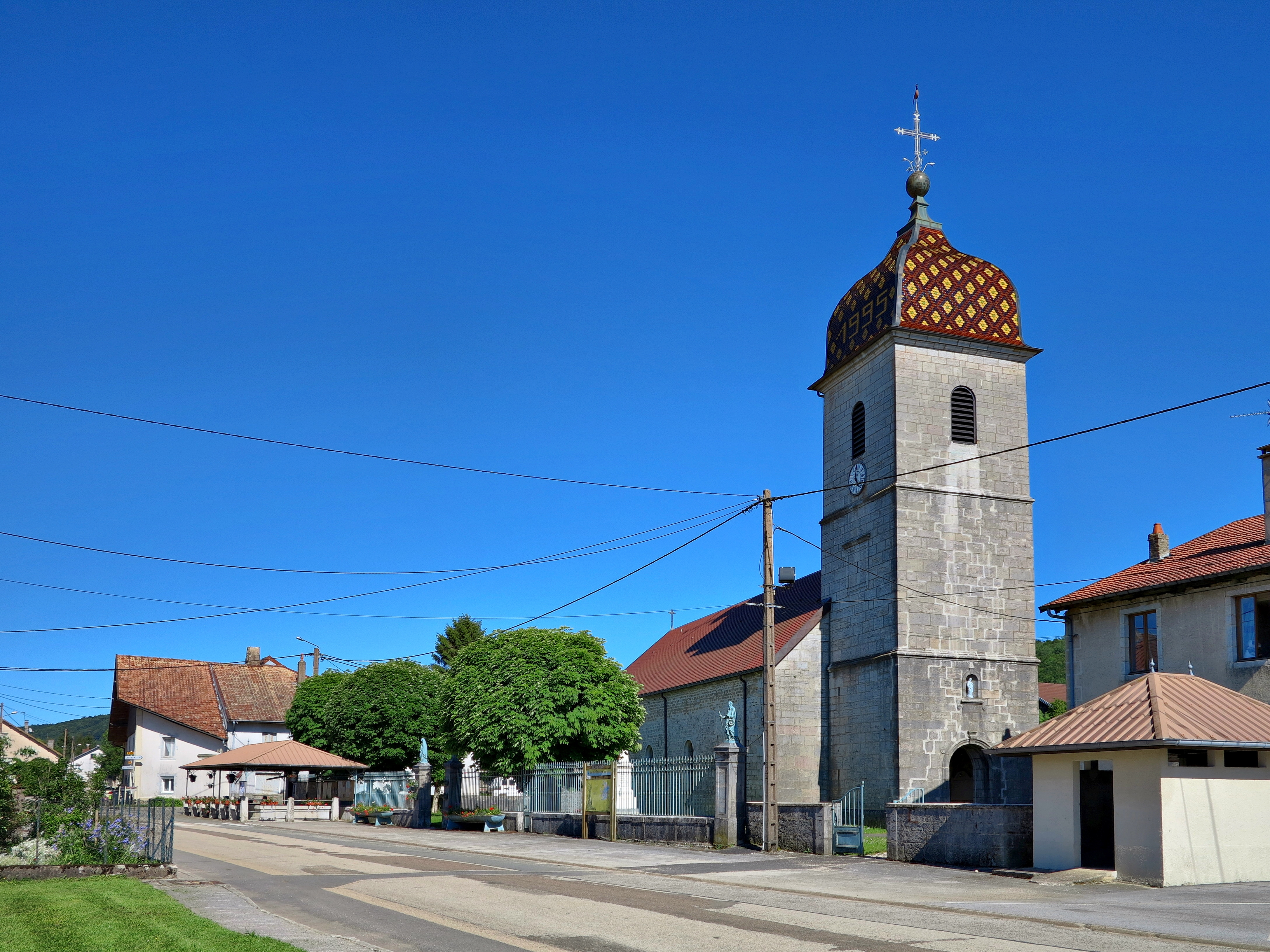 L'église